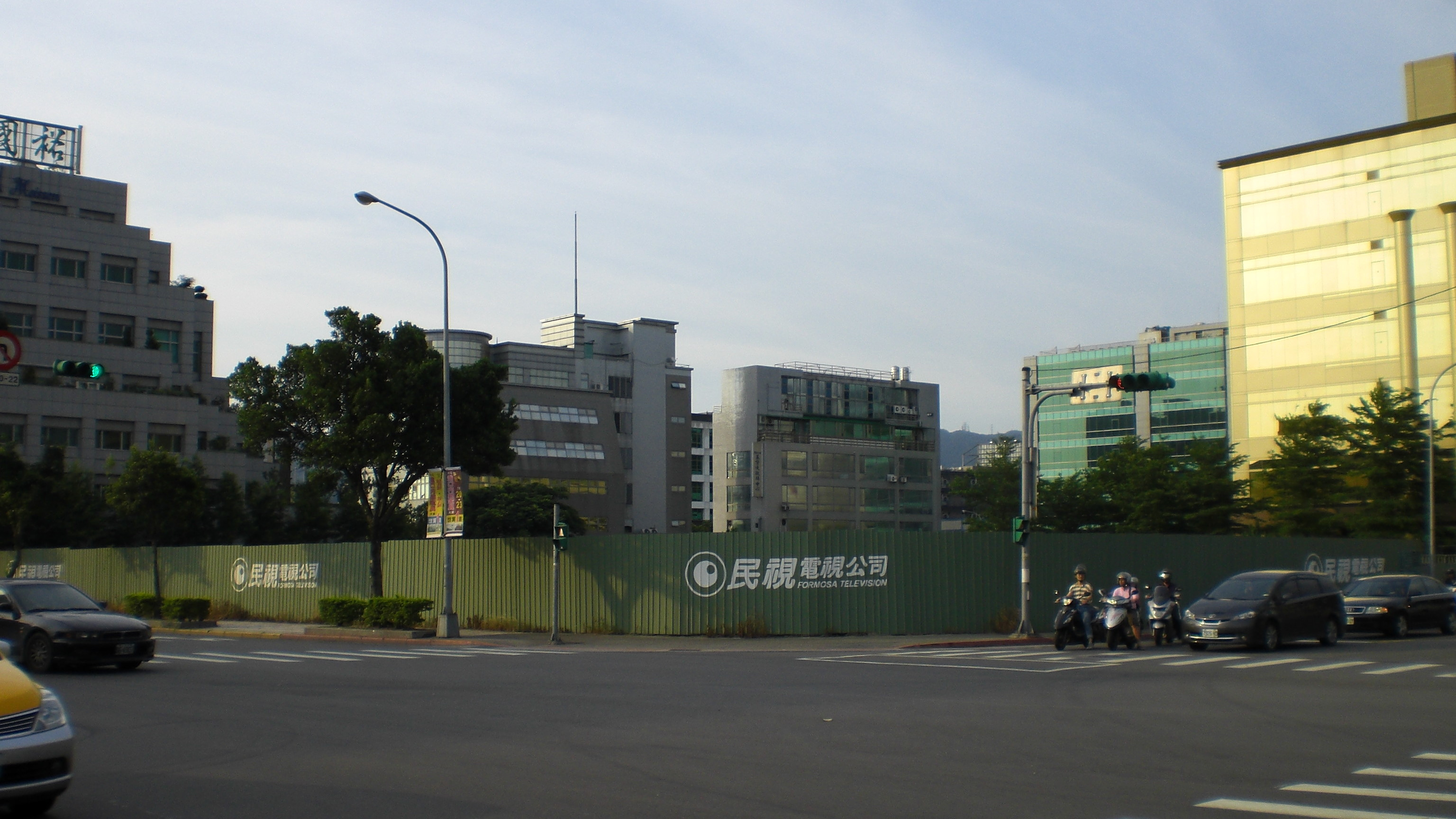 臺北市內湖區舊宗路一段及新湖三路交叉口，民間全民電視公司內湖大樓新建工程建地的荒涼景象。此工程未曾開工。